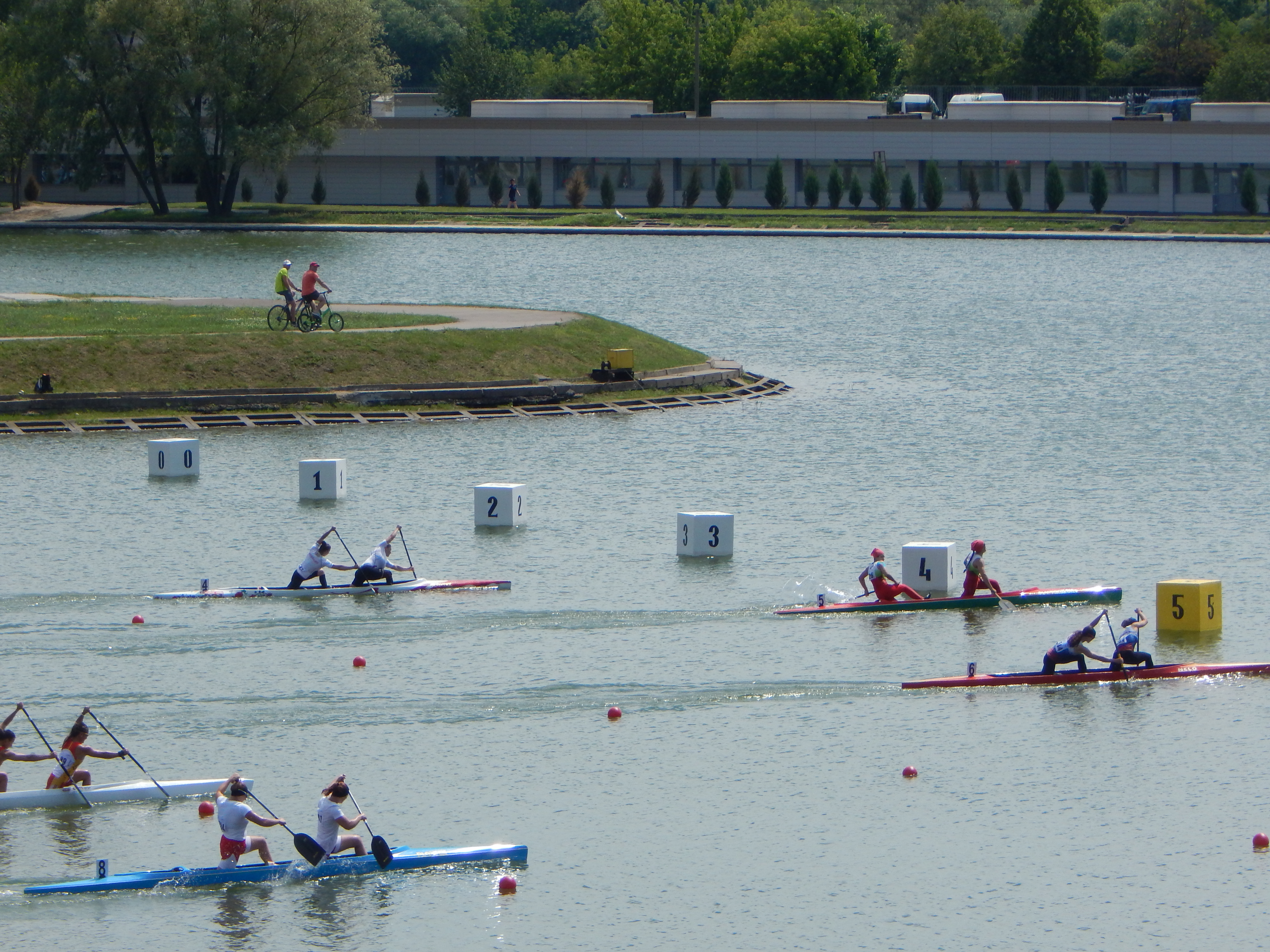 Финал, женская каноэ-двойка 500 м на чемпионате Европы 2016